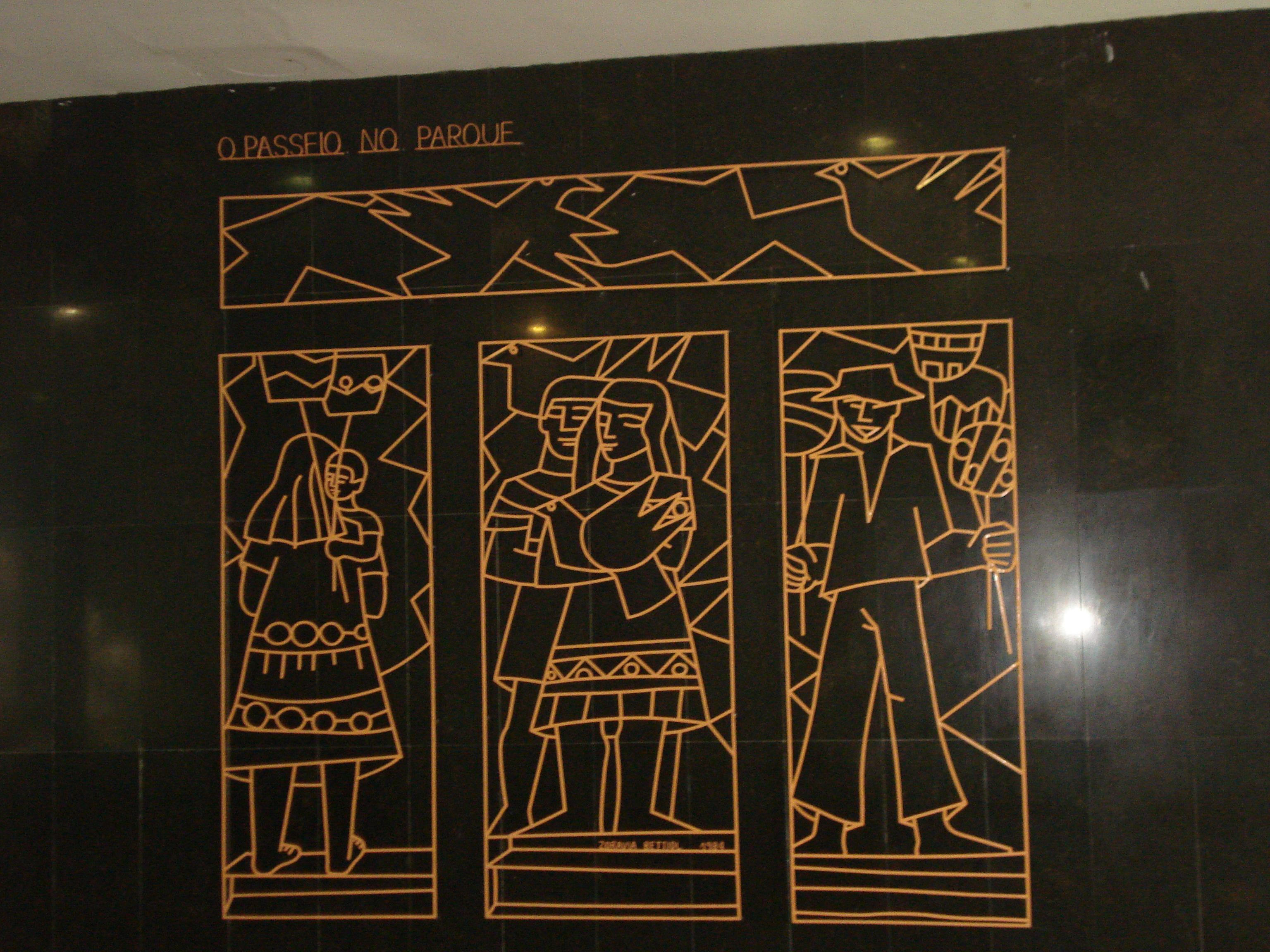 "O Passeio no Parque", mural em ferro da artista plástica brasileira Zorávia Bettiol. Encontra-se no Hospital Moinhos de Vento, em Porto Alegre.